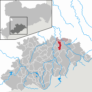 Börnichen/Erzgeb. im Erzgebirgskreis, Sachsen